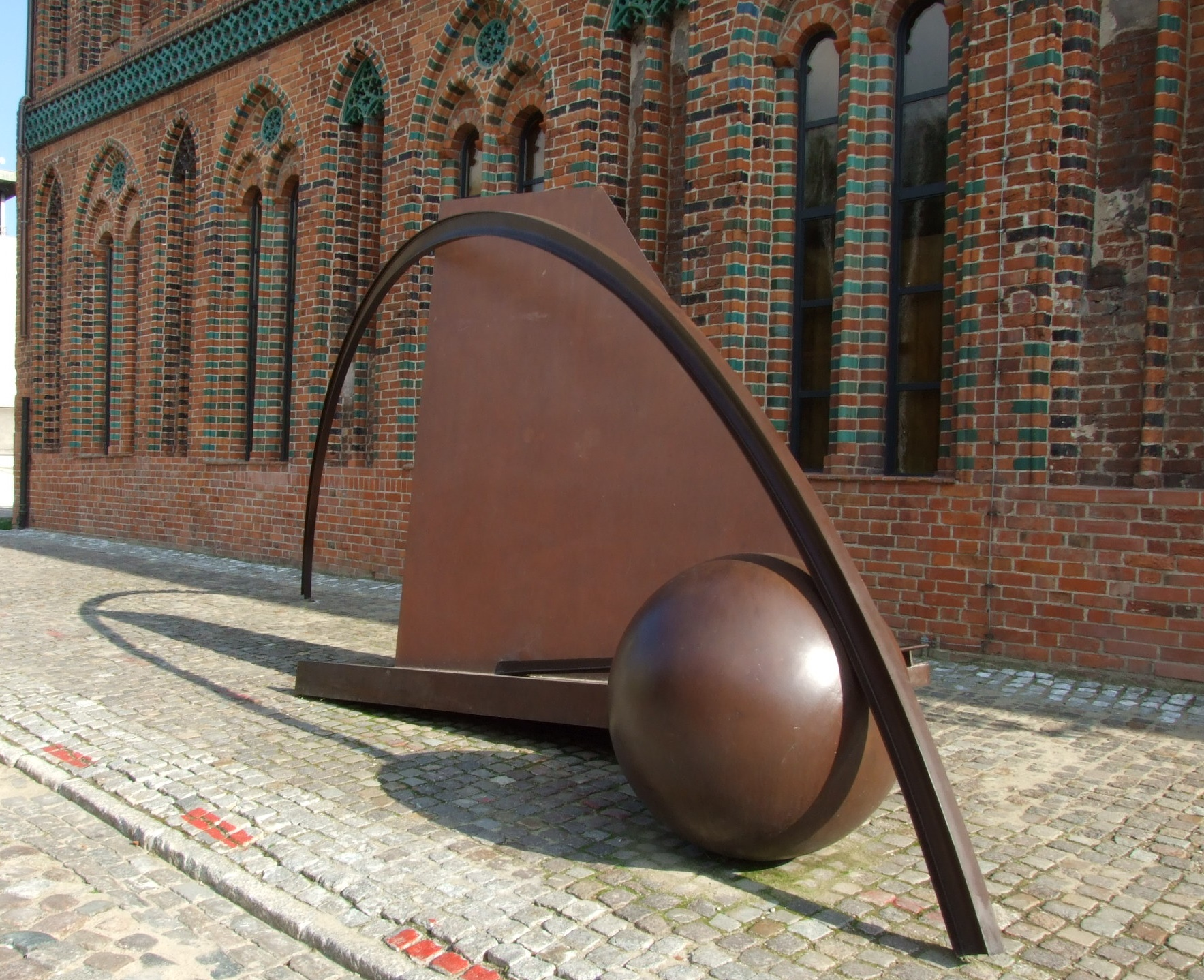 Żelazny "Wielki łuk"(1991) wykonany przez znanego niemieckiego rzeźbiarza - Bernarda Heiligera. W chwili obecnej dzieło znajduje się w depozycie Muzeum Narodowego w Szczecinie.